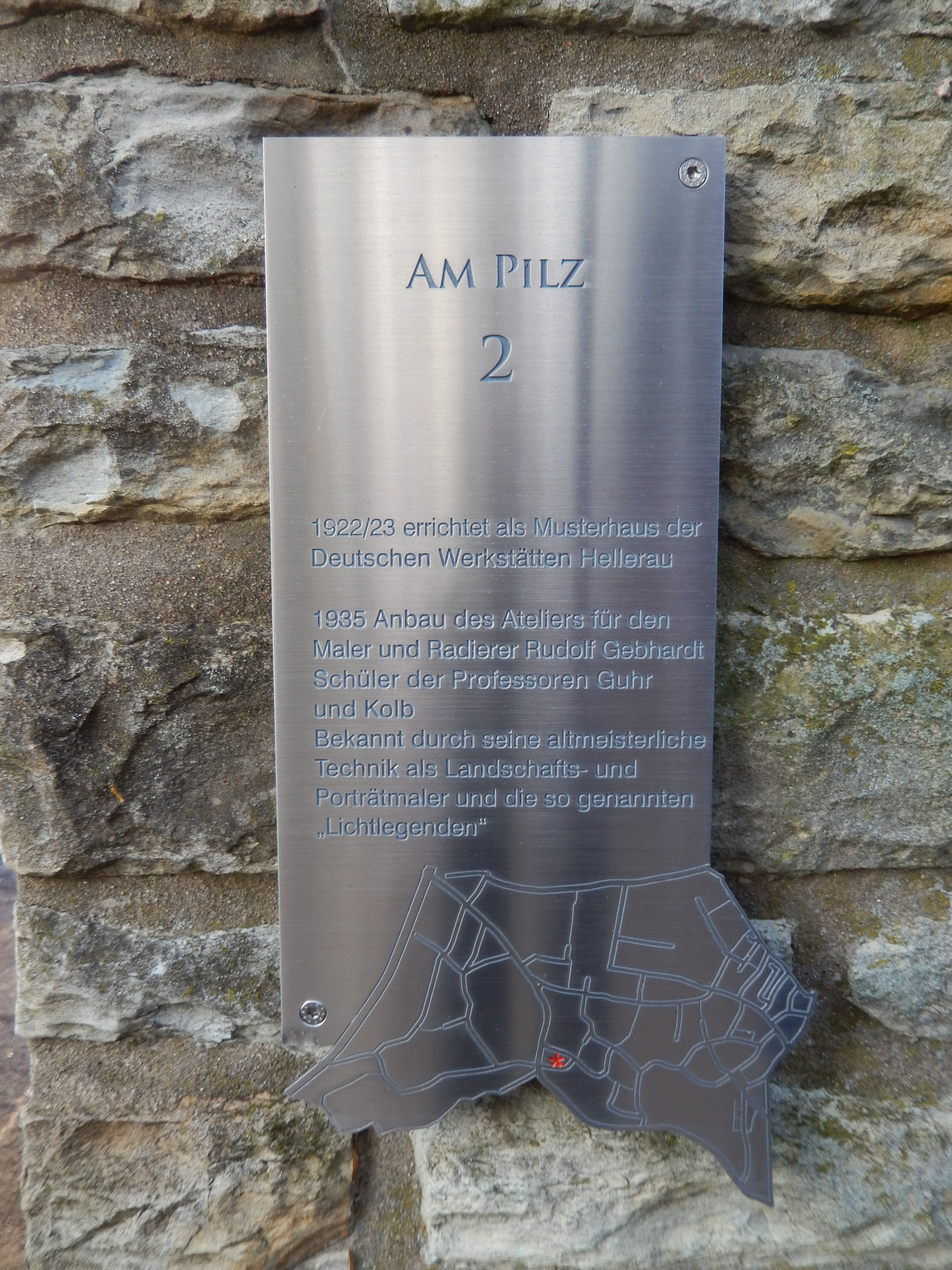 Dresden-Hellerau, Am Pilz 2: Gedenktafel für den Maer und Radierer Rudolf Gebhardt